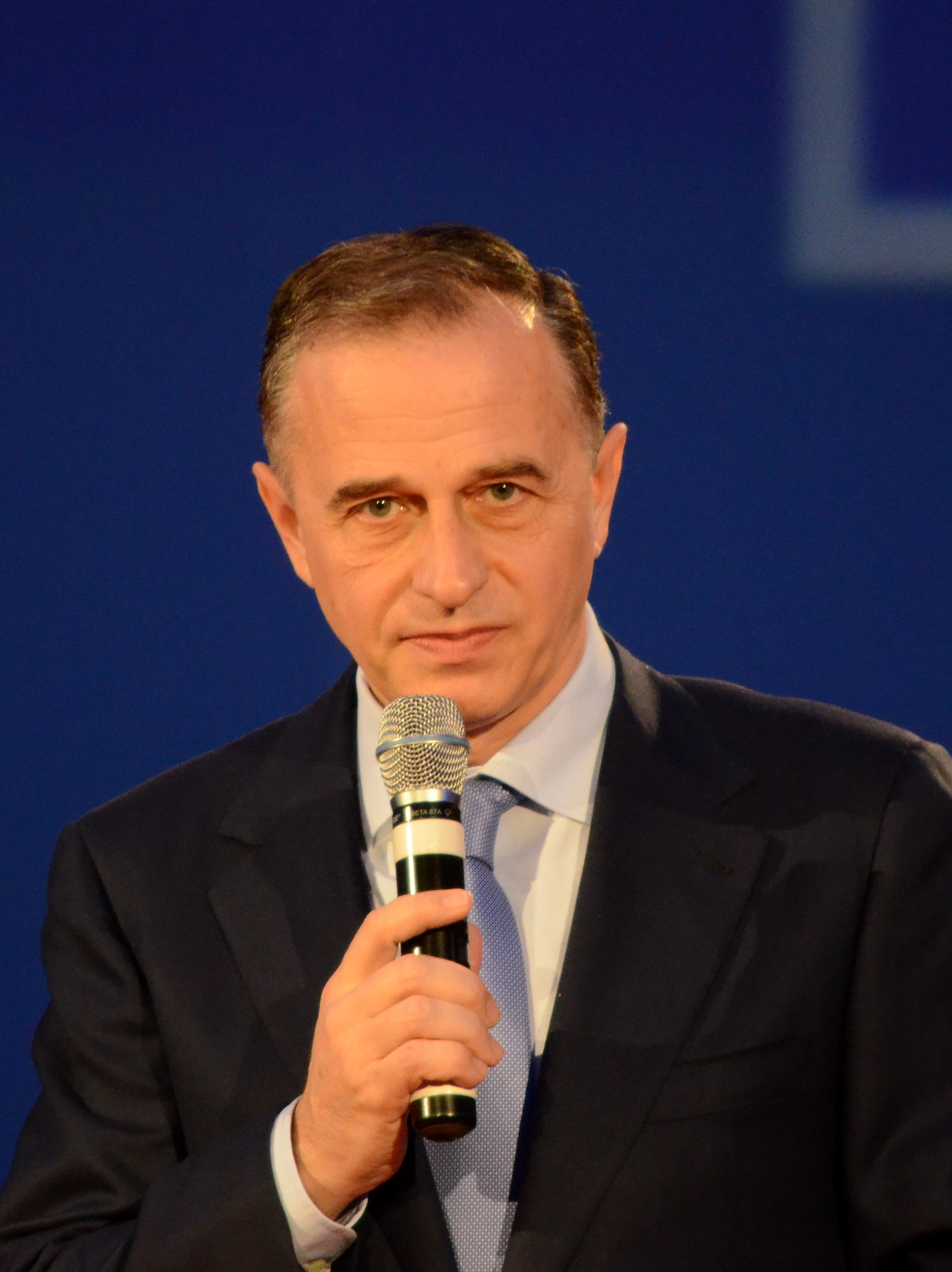 Mircea Geoană, la lansarea Mișcării "România Noastră".